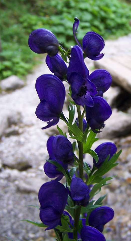 Aconitum napellus (pl. tojad mocny)